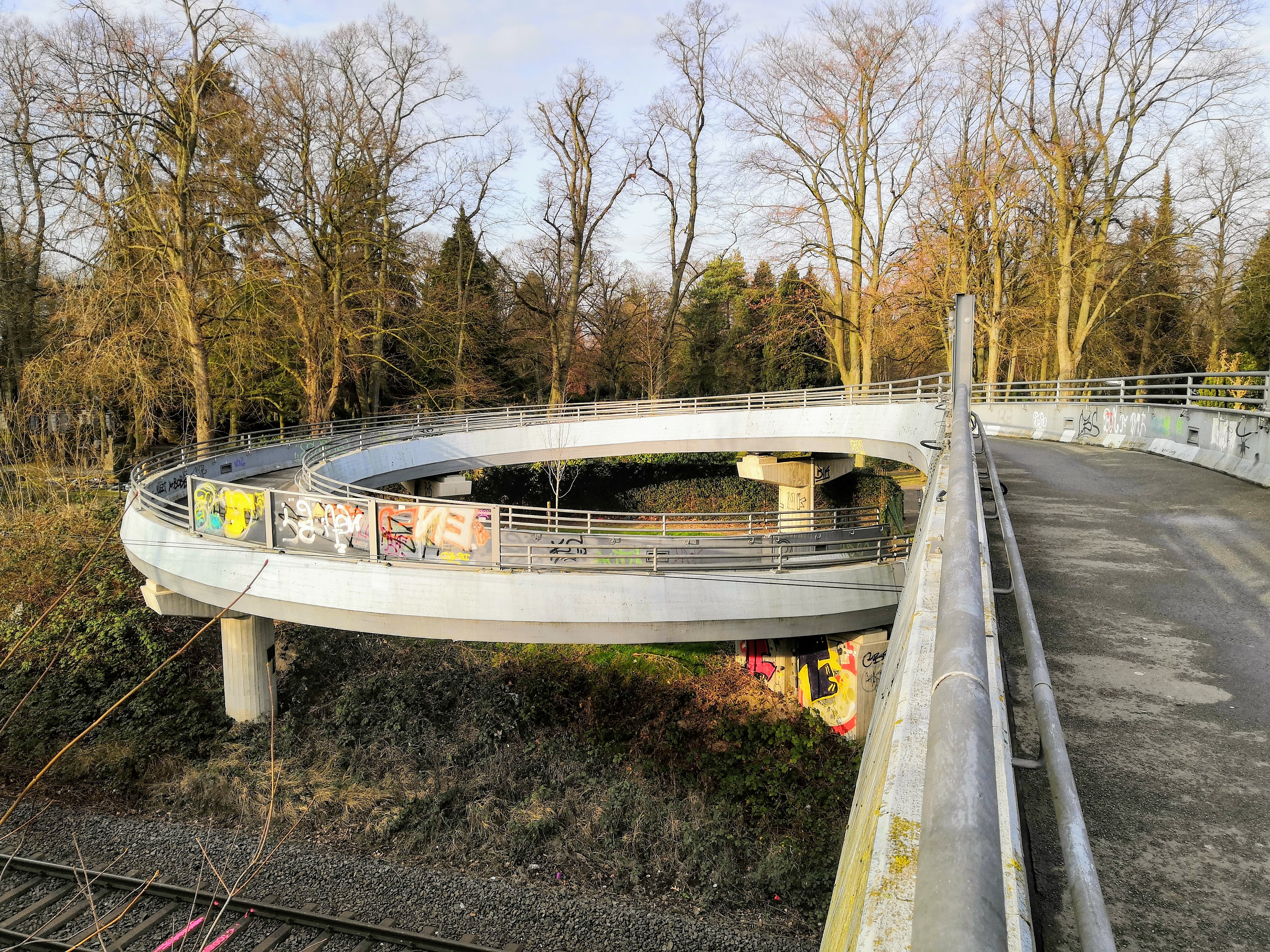 Die Fußgängerbrücke überbrückt die Lippsche Bahn in Herford und verbindet die Hermannstraße mit der Elverdisserstraße